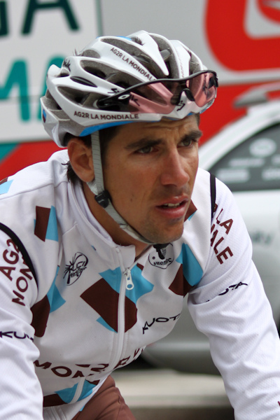 Prologue du Critérium du Dauphiné 2011, Saint Jean de Maurienne